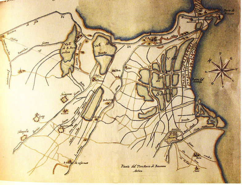 Territoire de Ravenne en 1604-1605